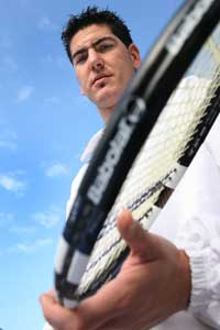 rostro